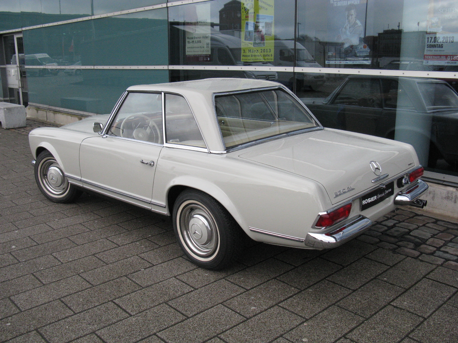 Mercedes-Benz 230 SL Pagoda